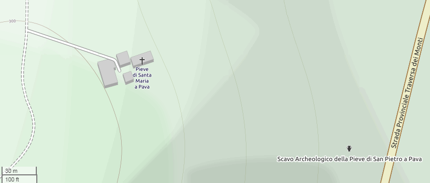 Mappa con il sito archeologico di San Pietro a Pava e la ex pieve di Santa Maria a Pava. - © OpenStreetMap contributors